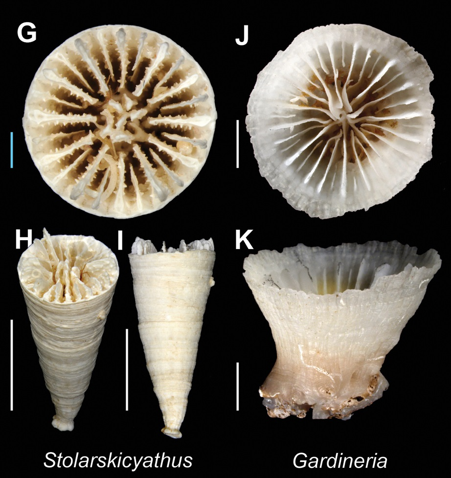 Recorte de imagen de Commons para aislar géneros de Gardineriidae